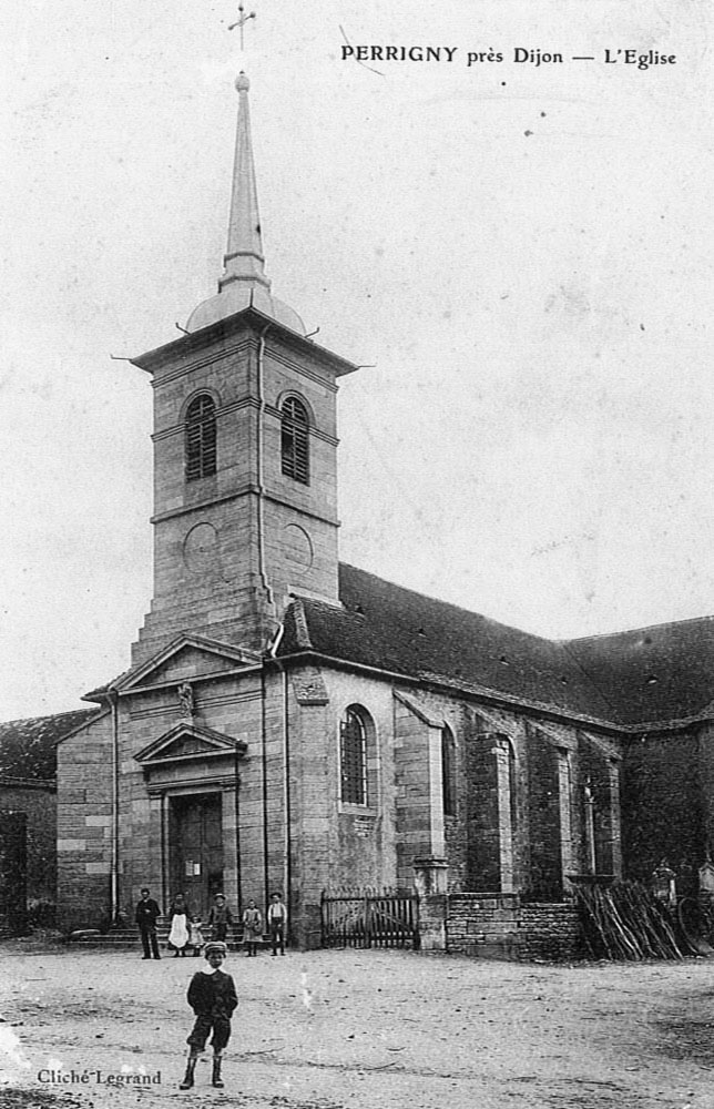 Eglise vers 1900